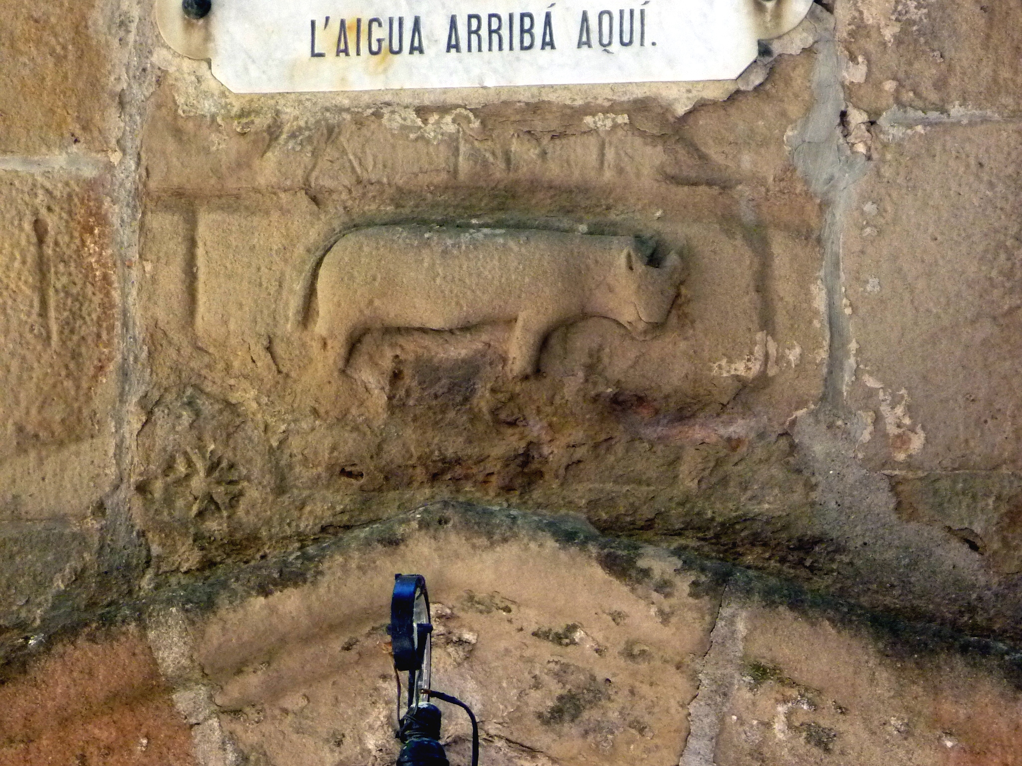 Font de la Vila de Torà: escut de Torà al portal